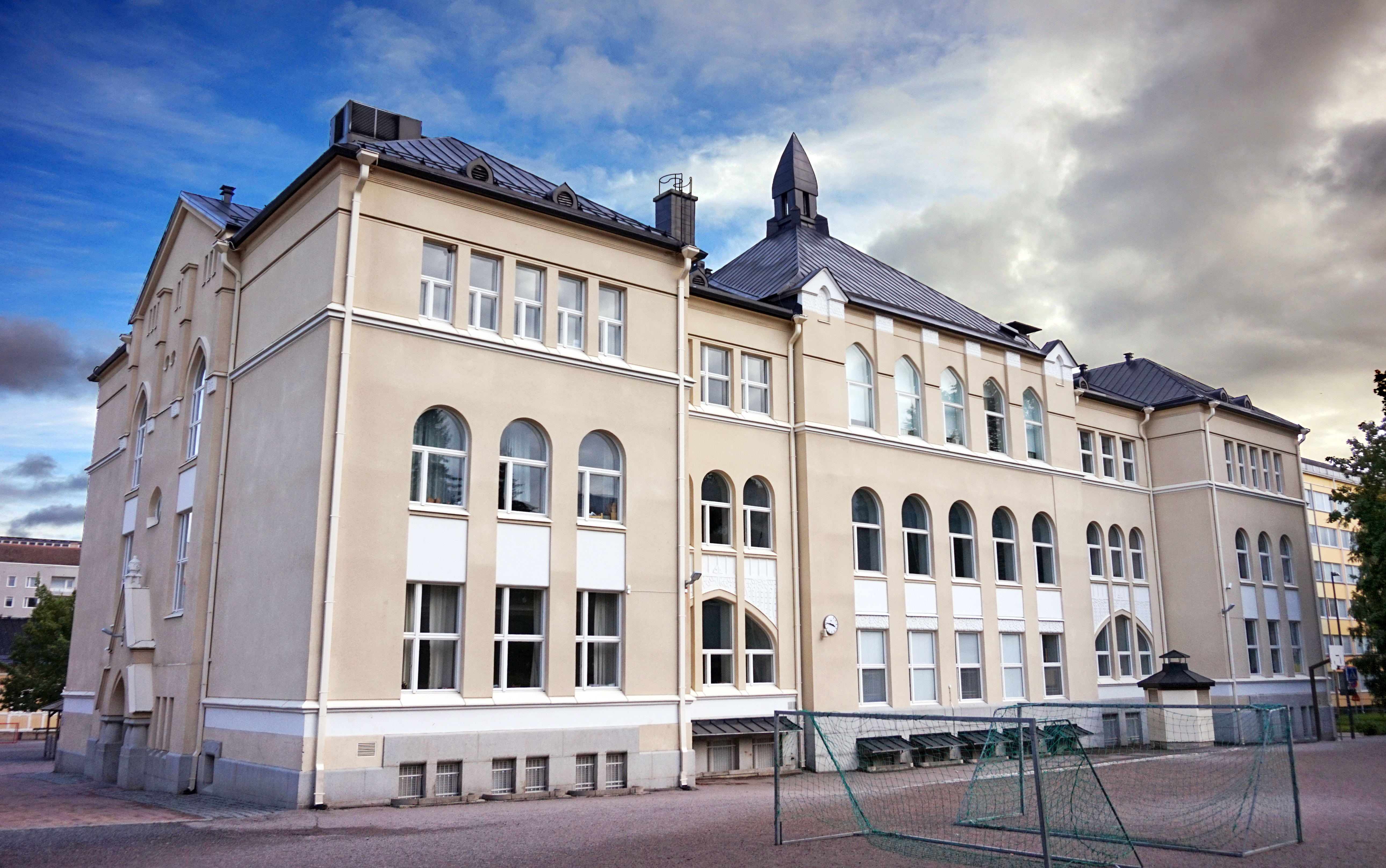 Aleksanterin koulu; peruskoulu Tampereella.